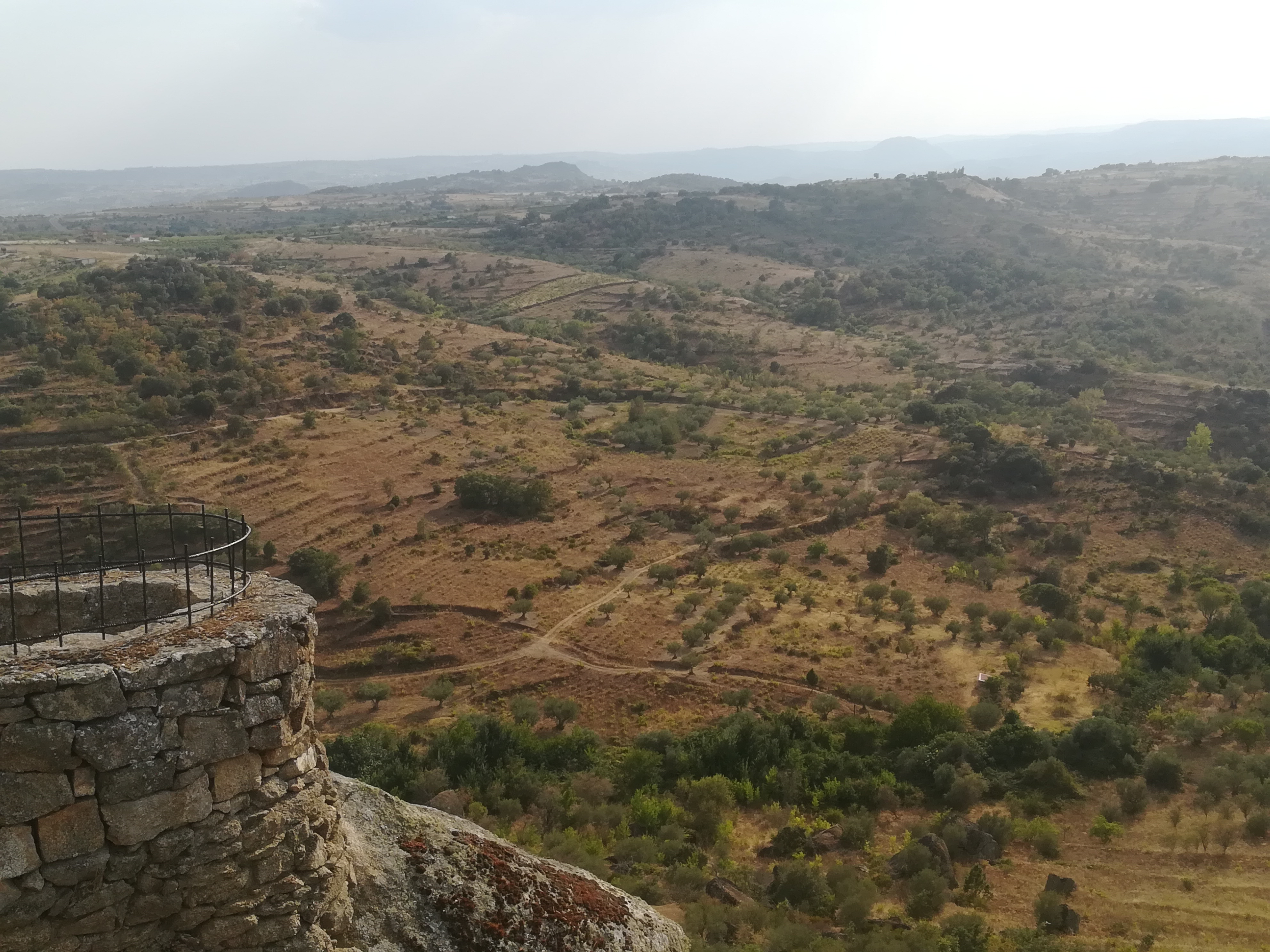 [Castillo de Fermoselle]